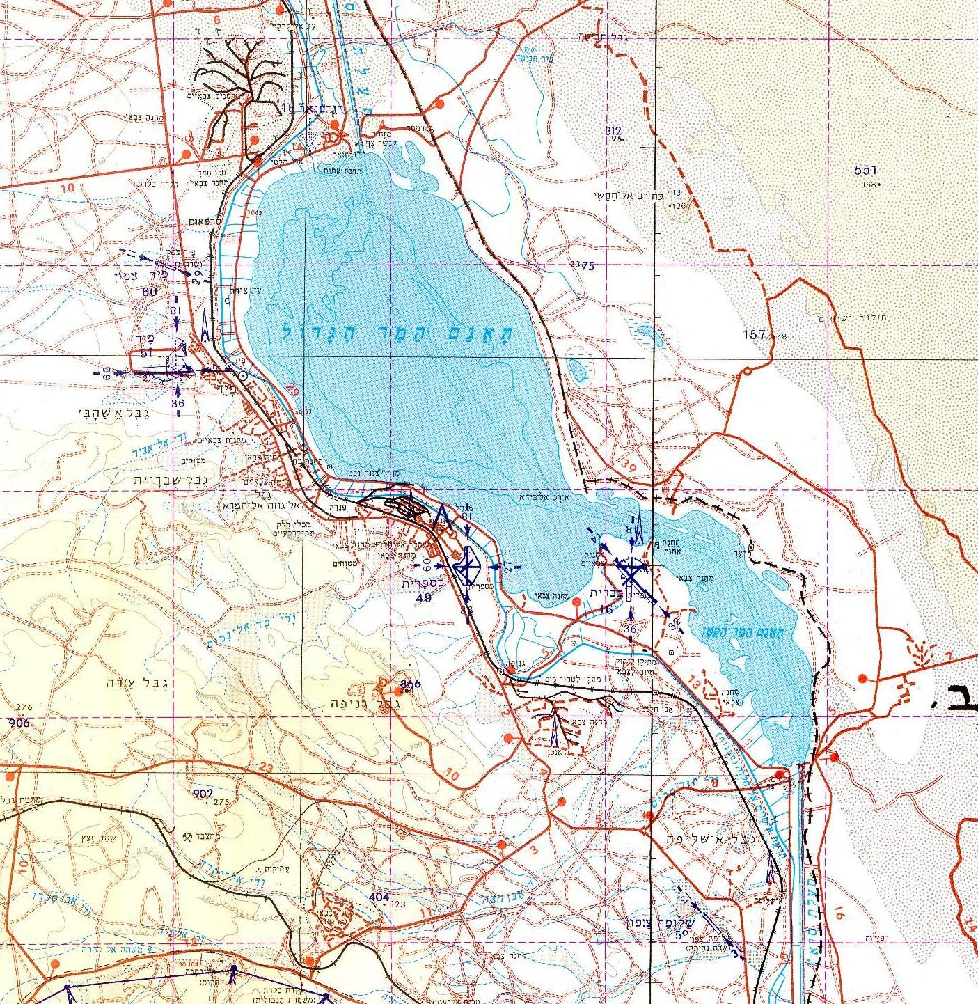 מפת הקומנדו המצרי באזור מפרץ סואץ - לפי כוחות קומנדו